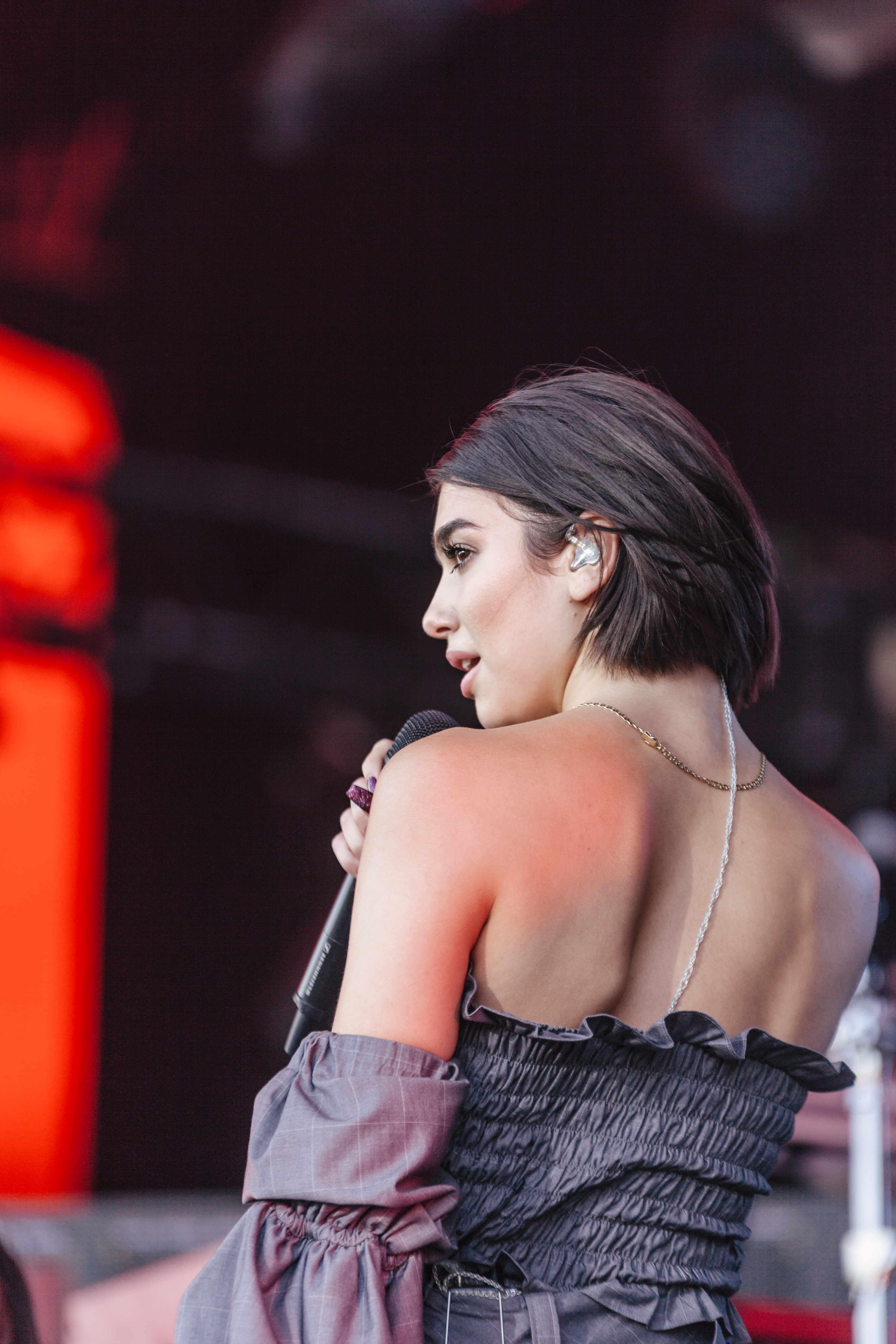 Festivalsommer This photo was created with the support of donations to Wikimedia Deutschland in the context of the CPB project "Festival Summer".